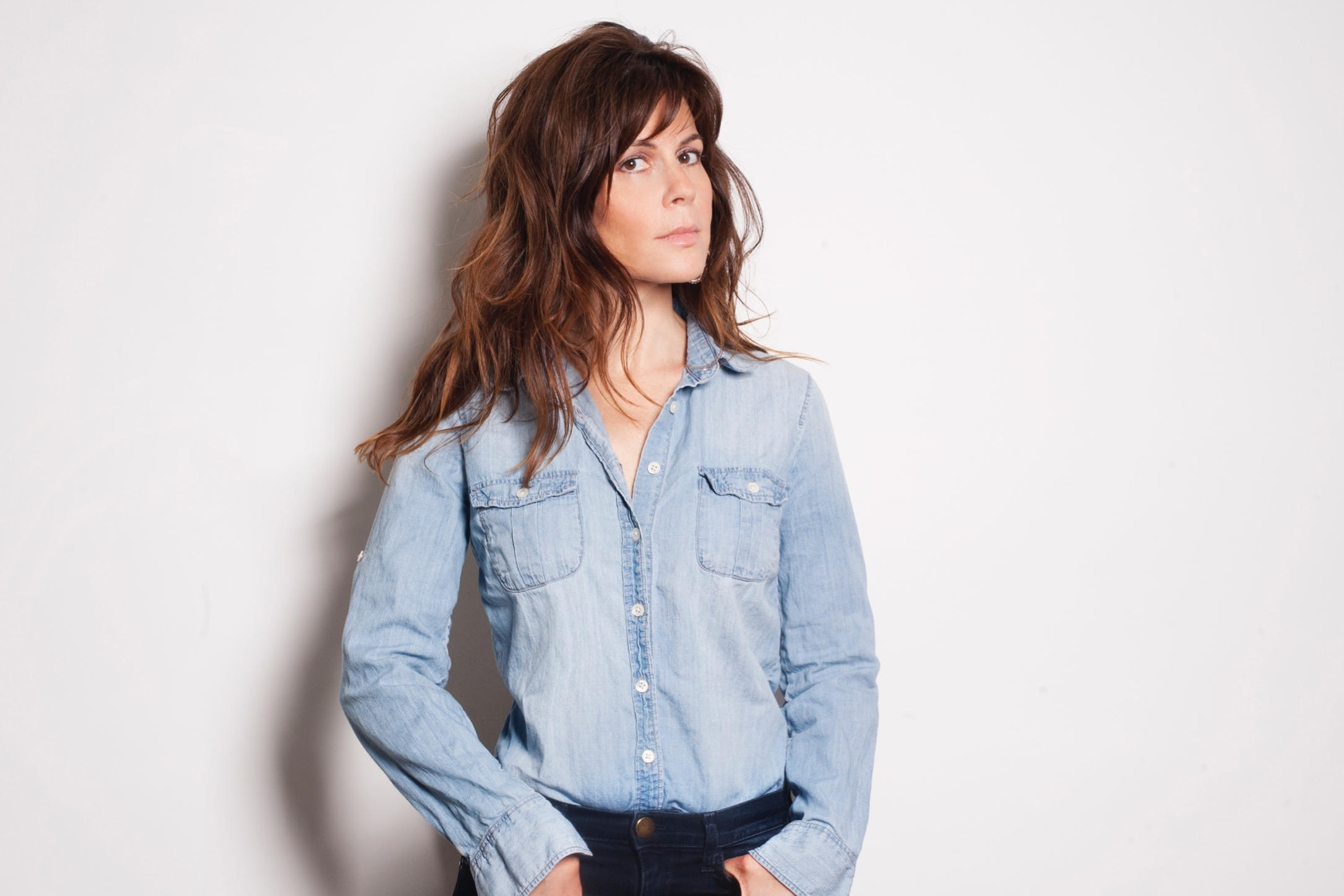 סיגל אבין